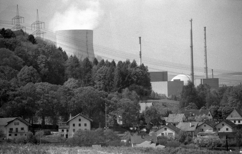 April 1988 Kernkraftwerk Niederaichbach bei Landshut Information added by Wikimedia users.von links: Kühlturm Kernkraftwerk Isar 2, Reaktorgebäude KKI 1, Reaktorgebäude KKI 2 (Kuppel), Reaktorgebäude KKN (inzwischen rückgebaut)